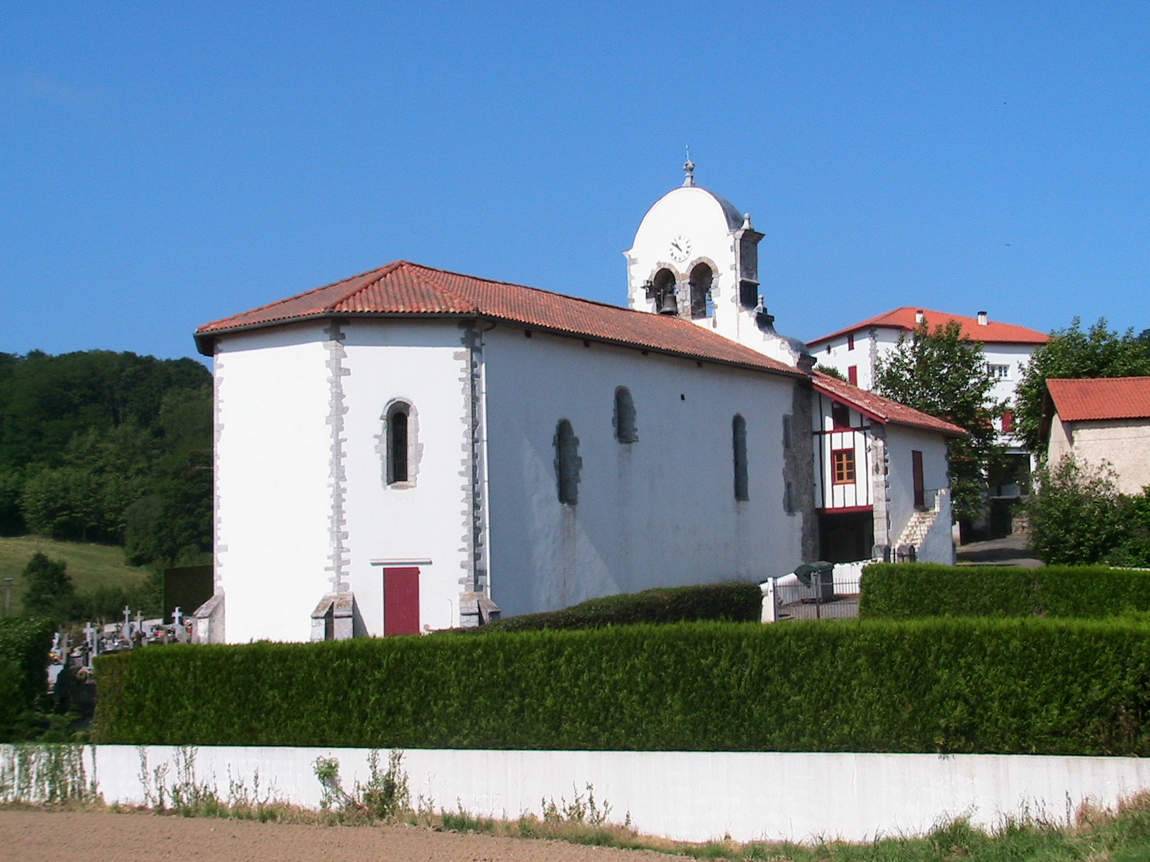 Église Saint-Étienne de Saint-Estebendécor intérieur (Inscrit) .